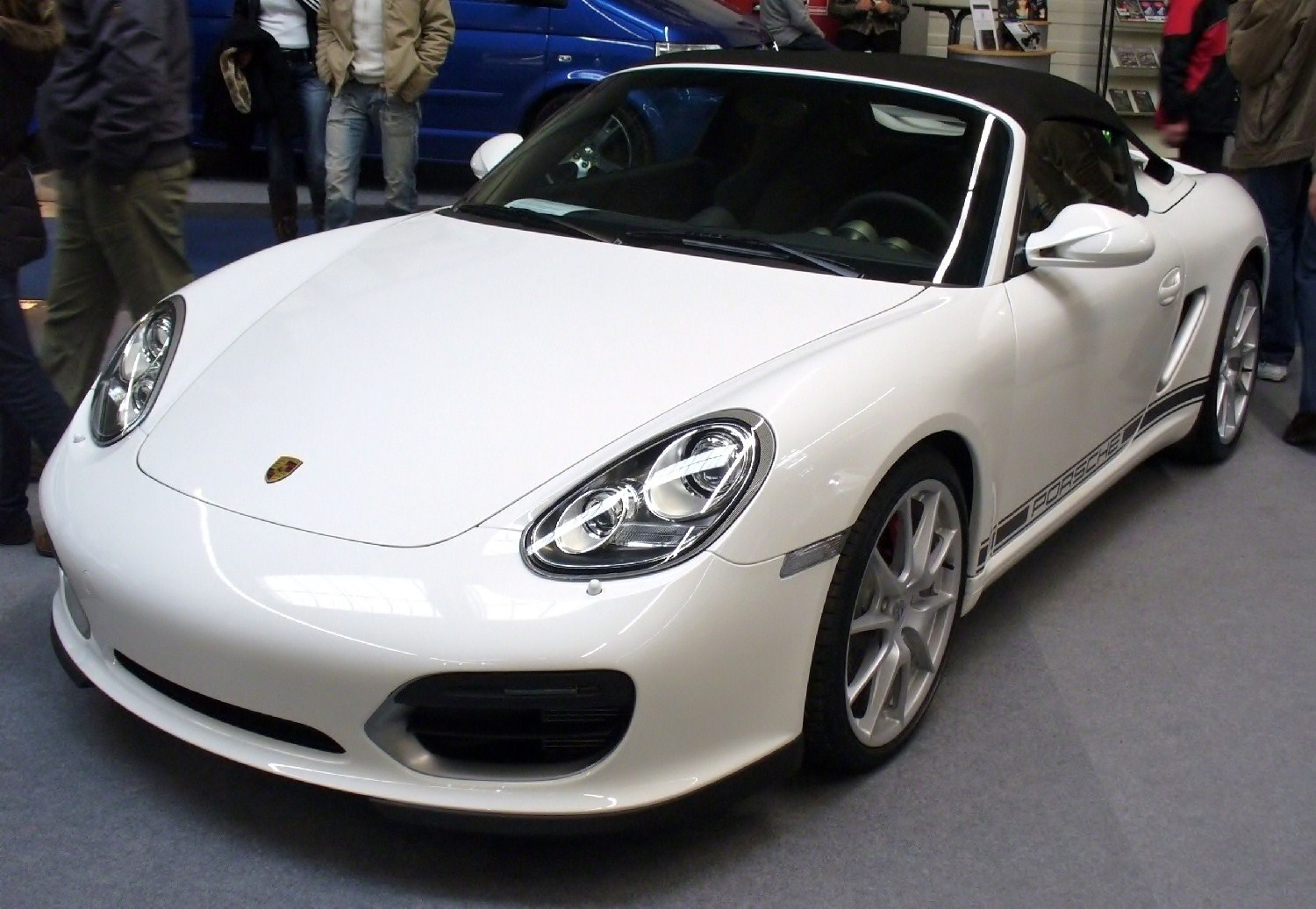 Porsche 987 Boxster Spyder